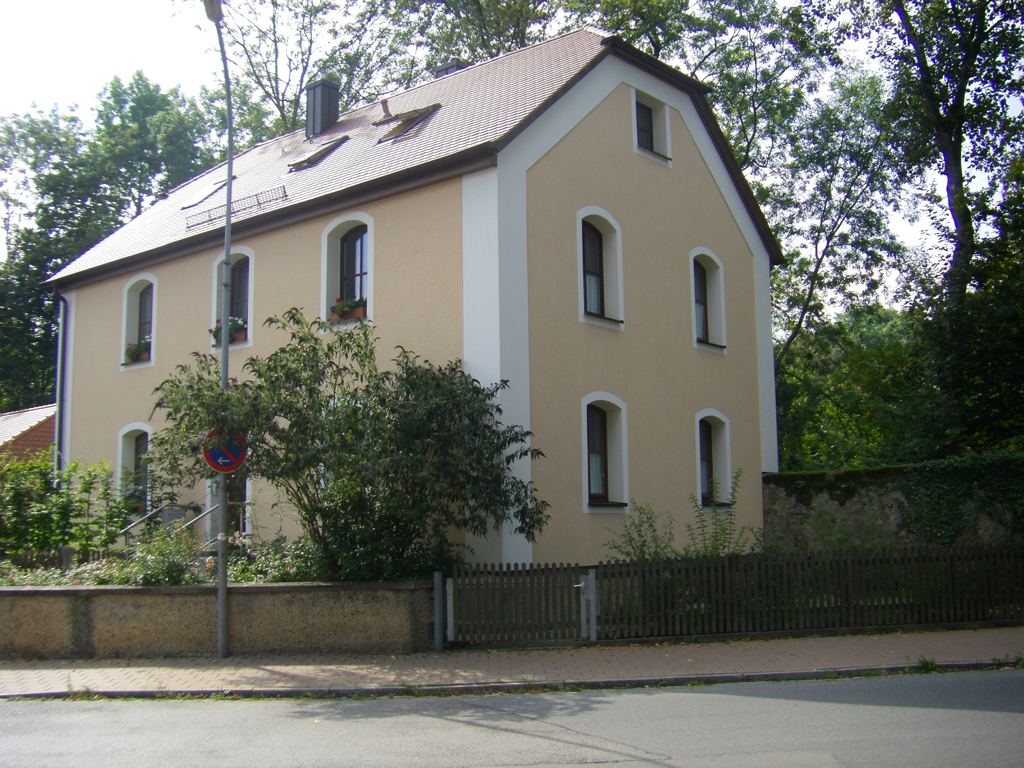 Baudenkmal; Meßnerhaus; Hauptstraße 24; Neuendettelsau